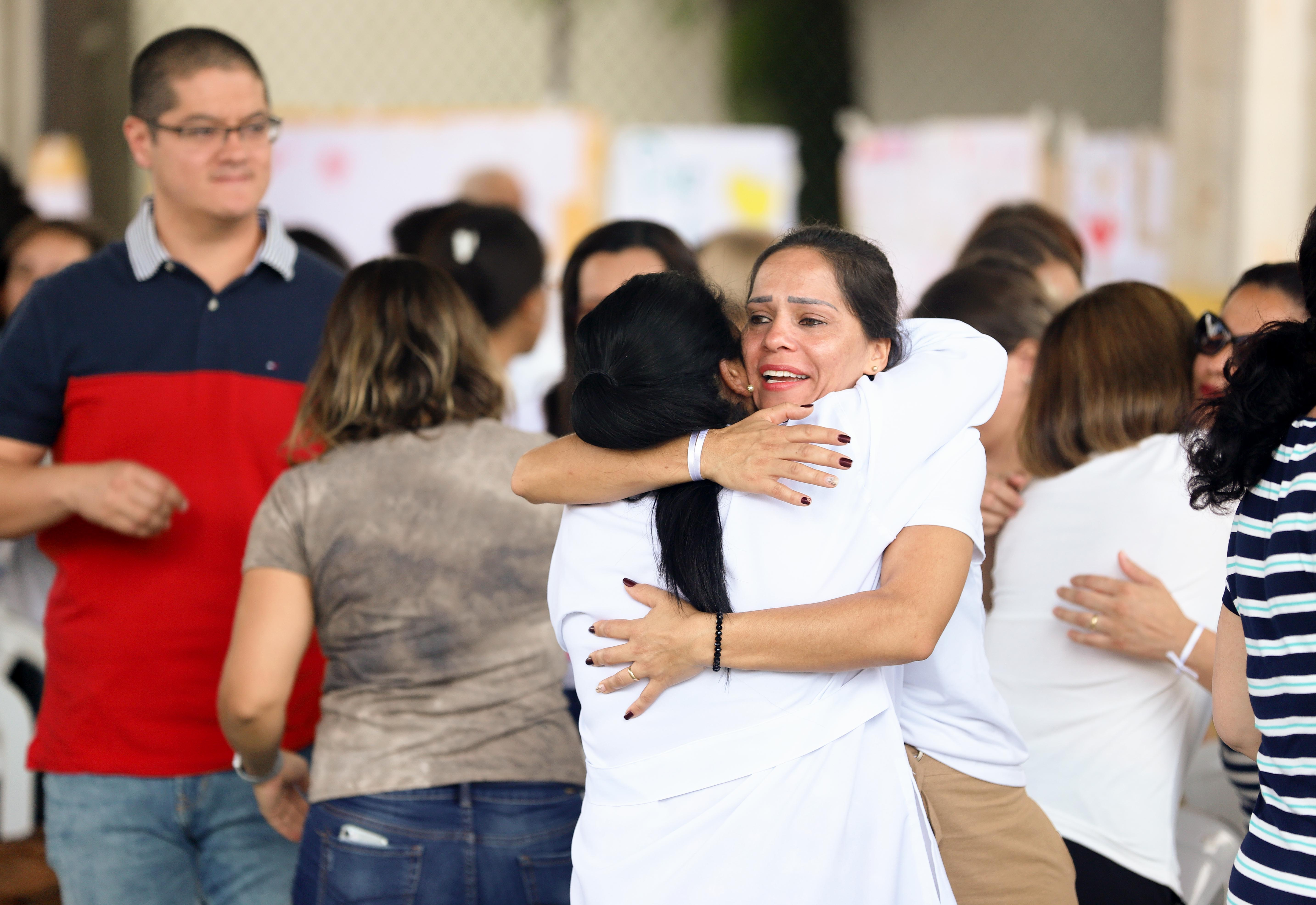 O secretário de Estado da Educação, Rossieli Soares, participa do culto ecumênico realizado na Escola Estadual Professor Raul Brasil, em Suzano. Local: Suzano/SP Data: 20/03/2019 Foto: Governo do Estado de São Paulo